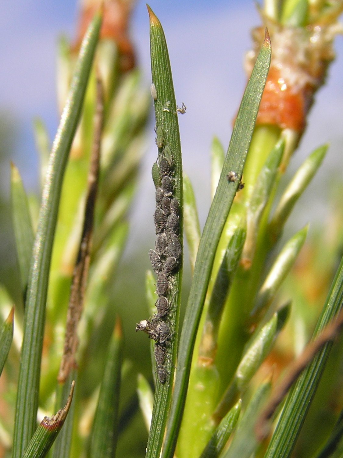 Cinara pini, Miodownica sosnowa, Polska